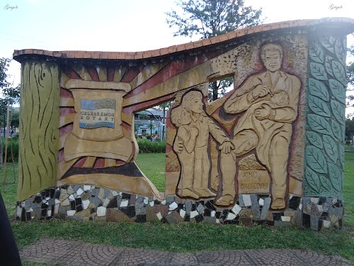 monumento